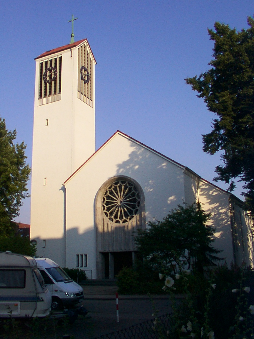 Bielefeld: katholische Kirche Sankt Meinolf